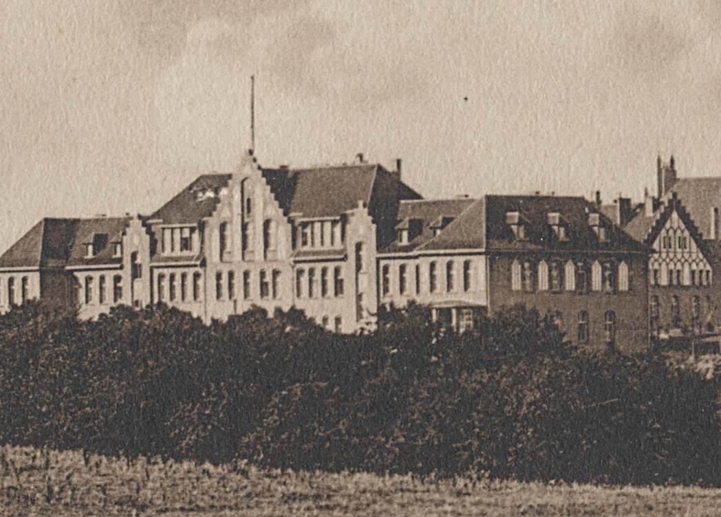 Mürwiker Burg um 1910, geerbt